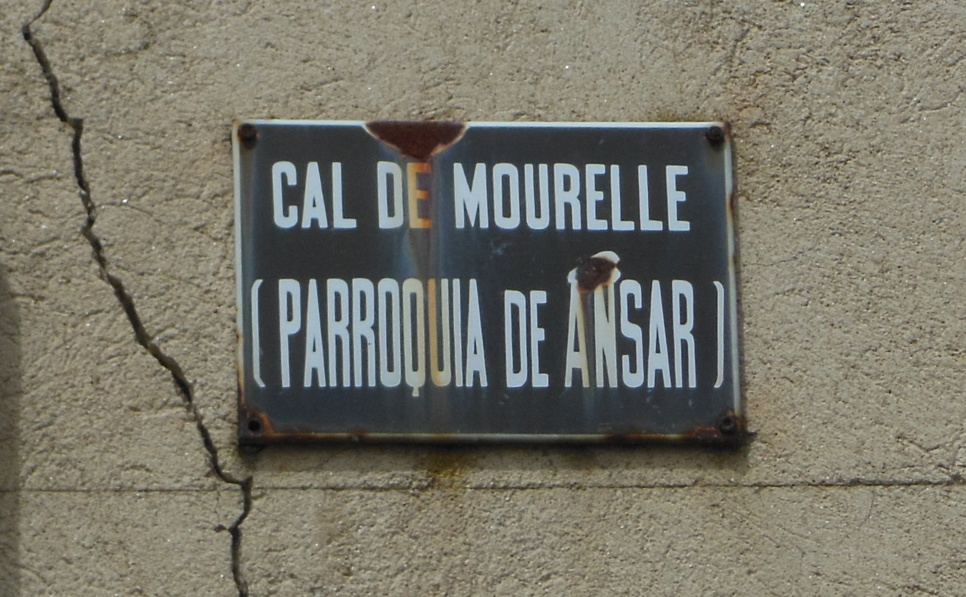 Sinal no lugar de Cal de Mourelle (Ansar, Taboada)